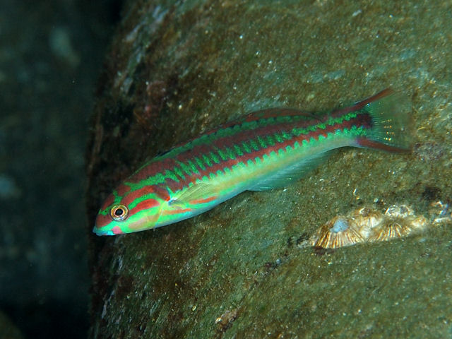 ハコベラ Thalassoma quinquevittatum